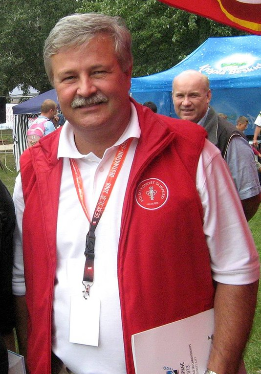 Apoloniusz Tajner (ur. 17 kwietnia 1954 w Goleszowie k/Cieszyna), narciarz klasyczny, trener